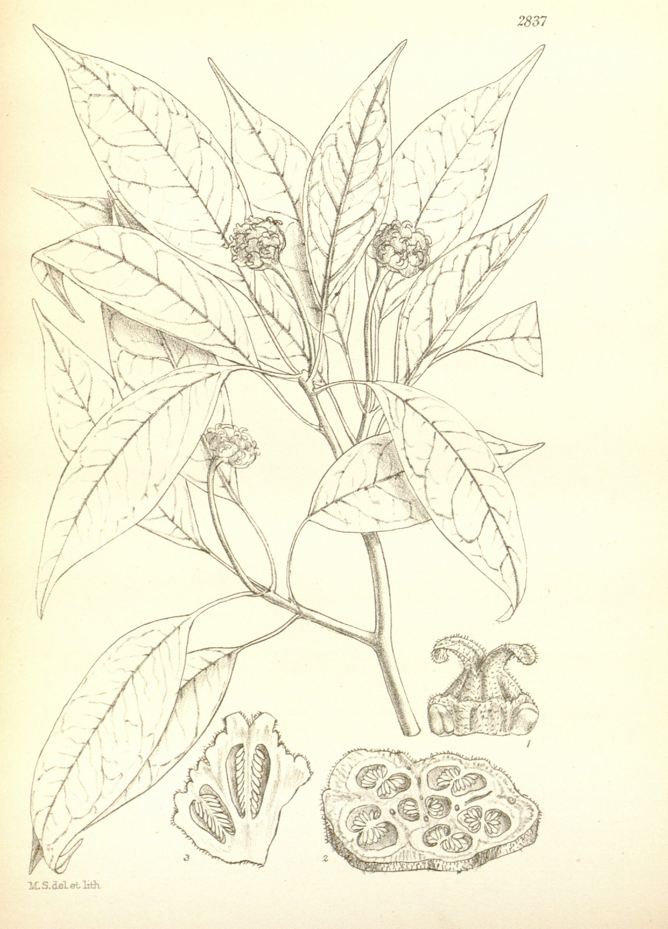 Altingia gracilipes, Altingiaceae